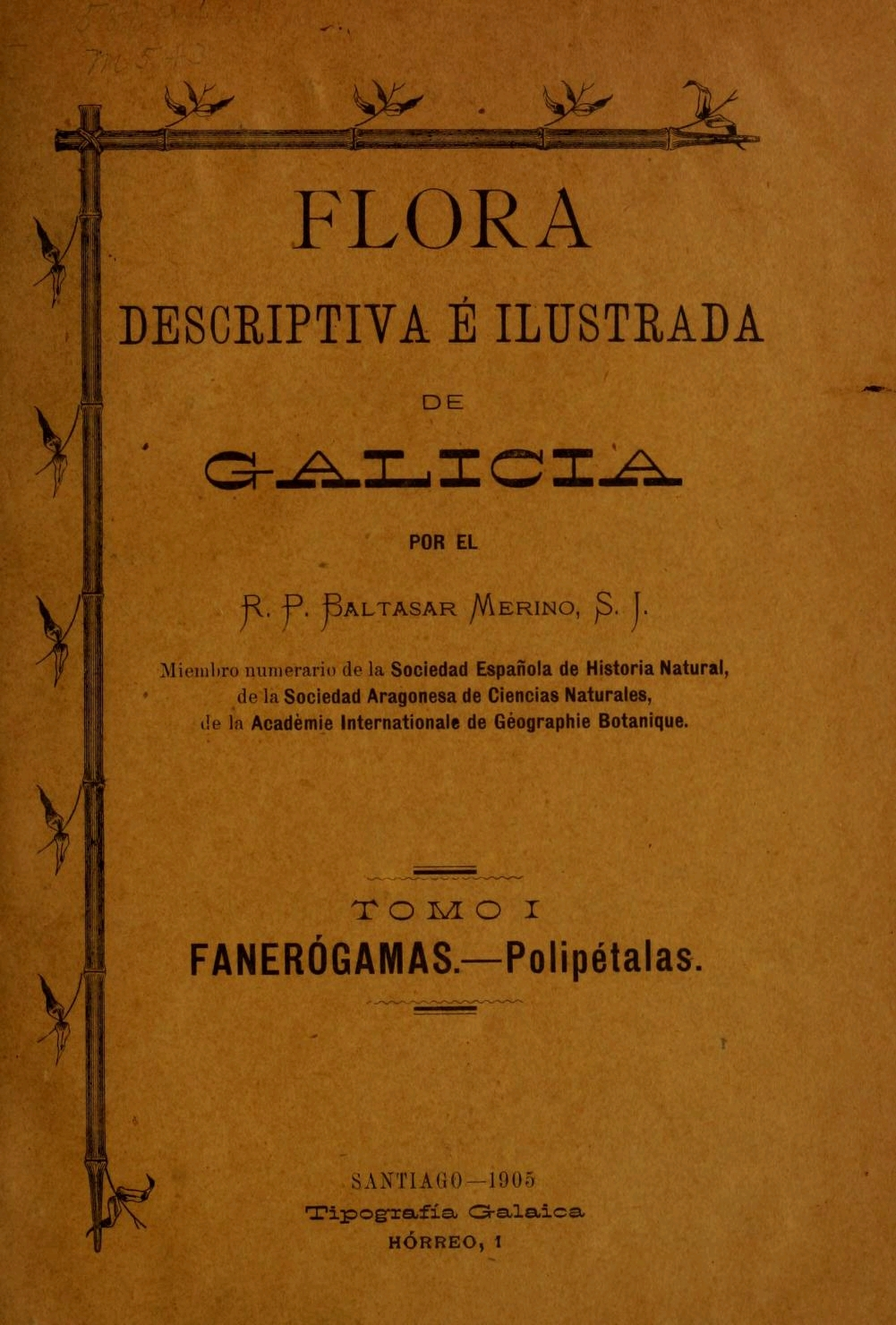 Portada do libro Flora descriptiva é ilustrada de Galicia do botánico español Baltasar Merino, publicado en 1905.